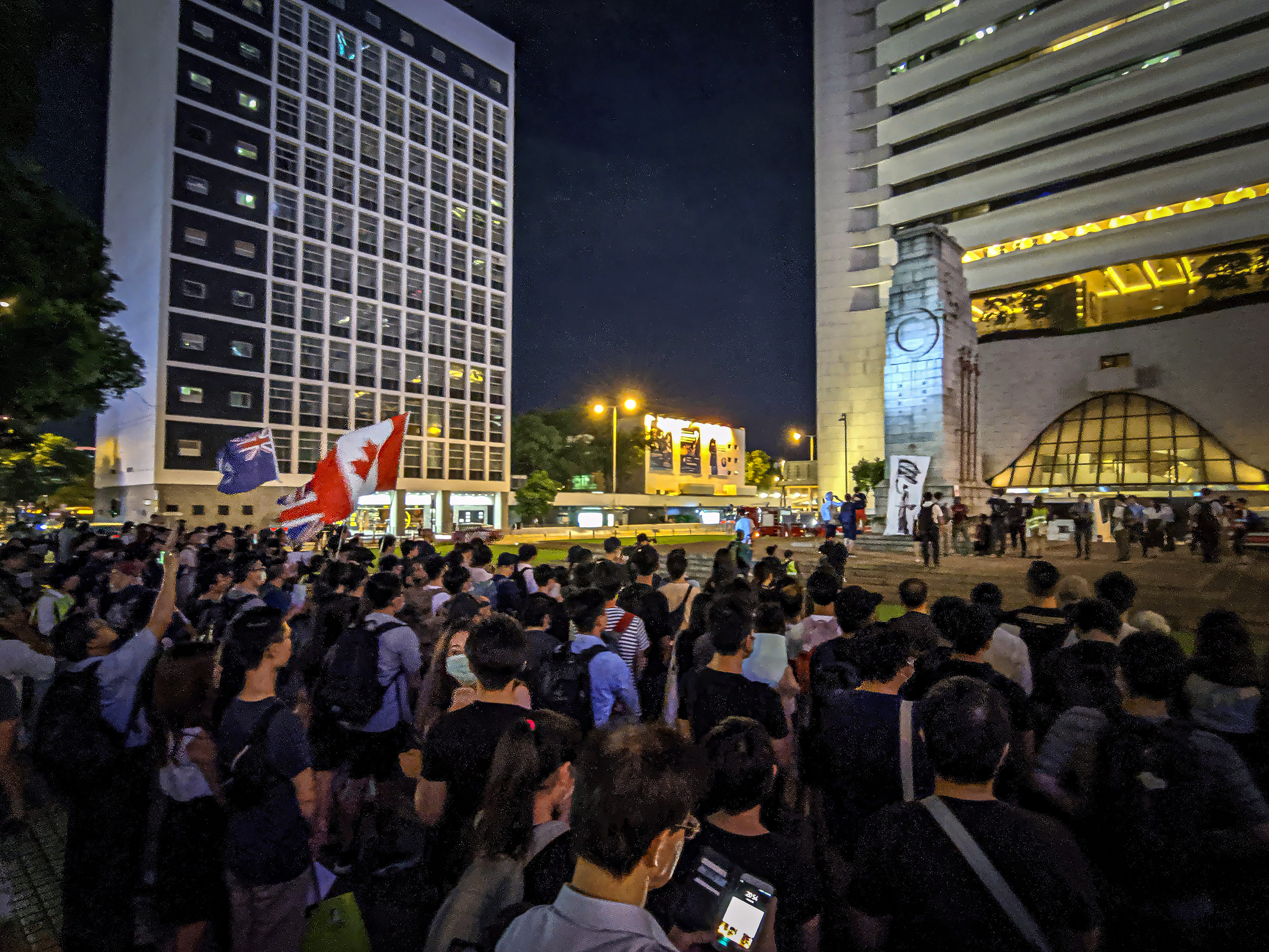 IMG_20190830_205439-edit